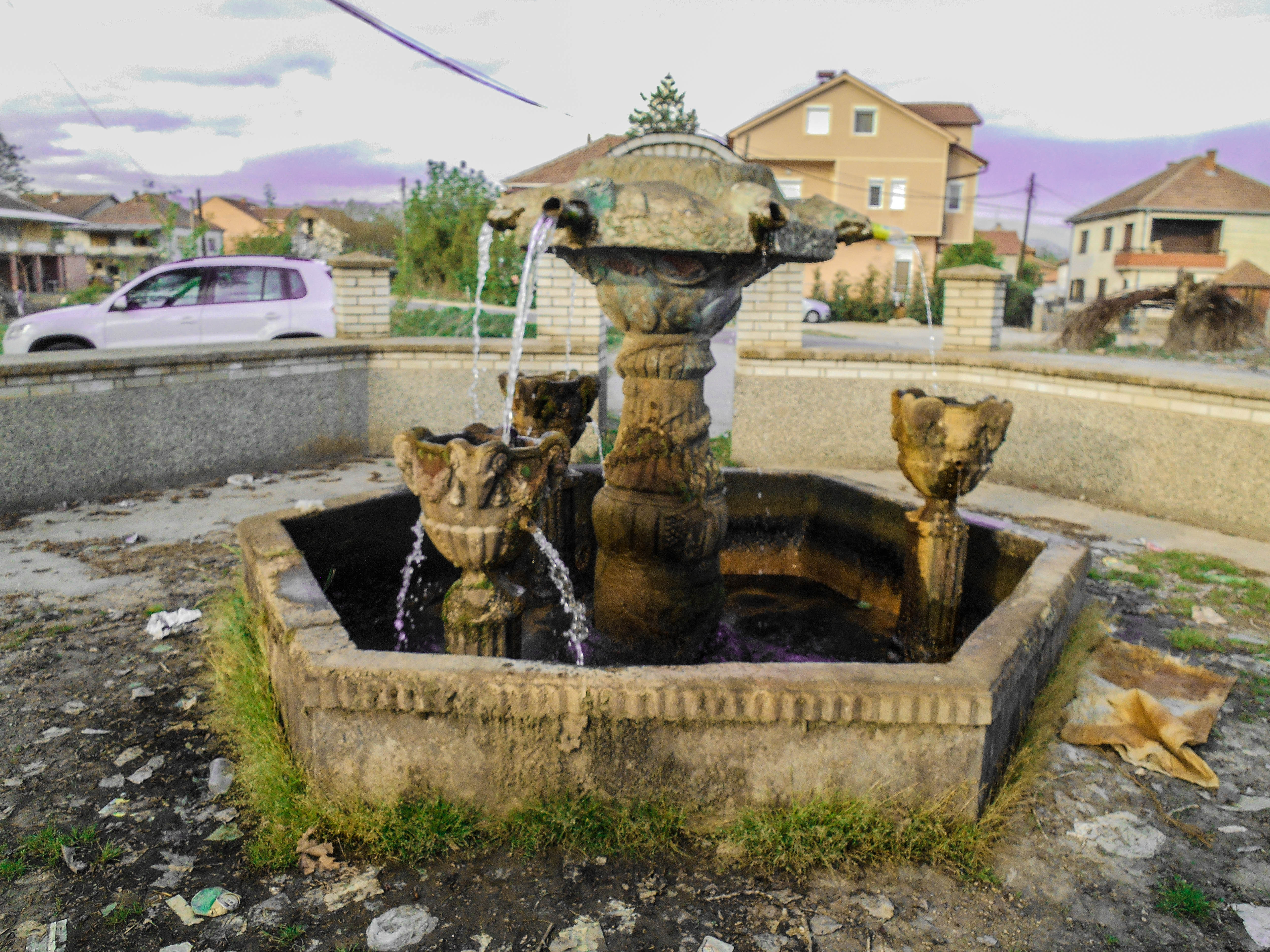 Селска чешма